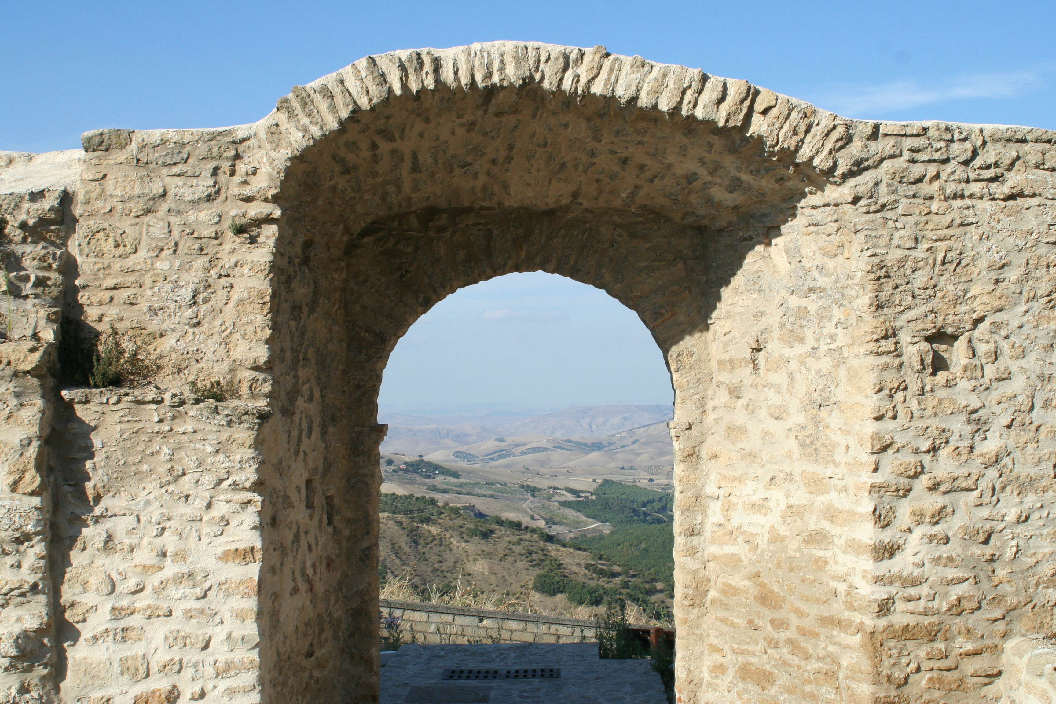 Autore: Rocco Stasi. Fonte: Fatta da me. Descrizione: Porta Saracena vista dall'interno dell'abitato. GFDL, sono l'autore.